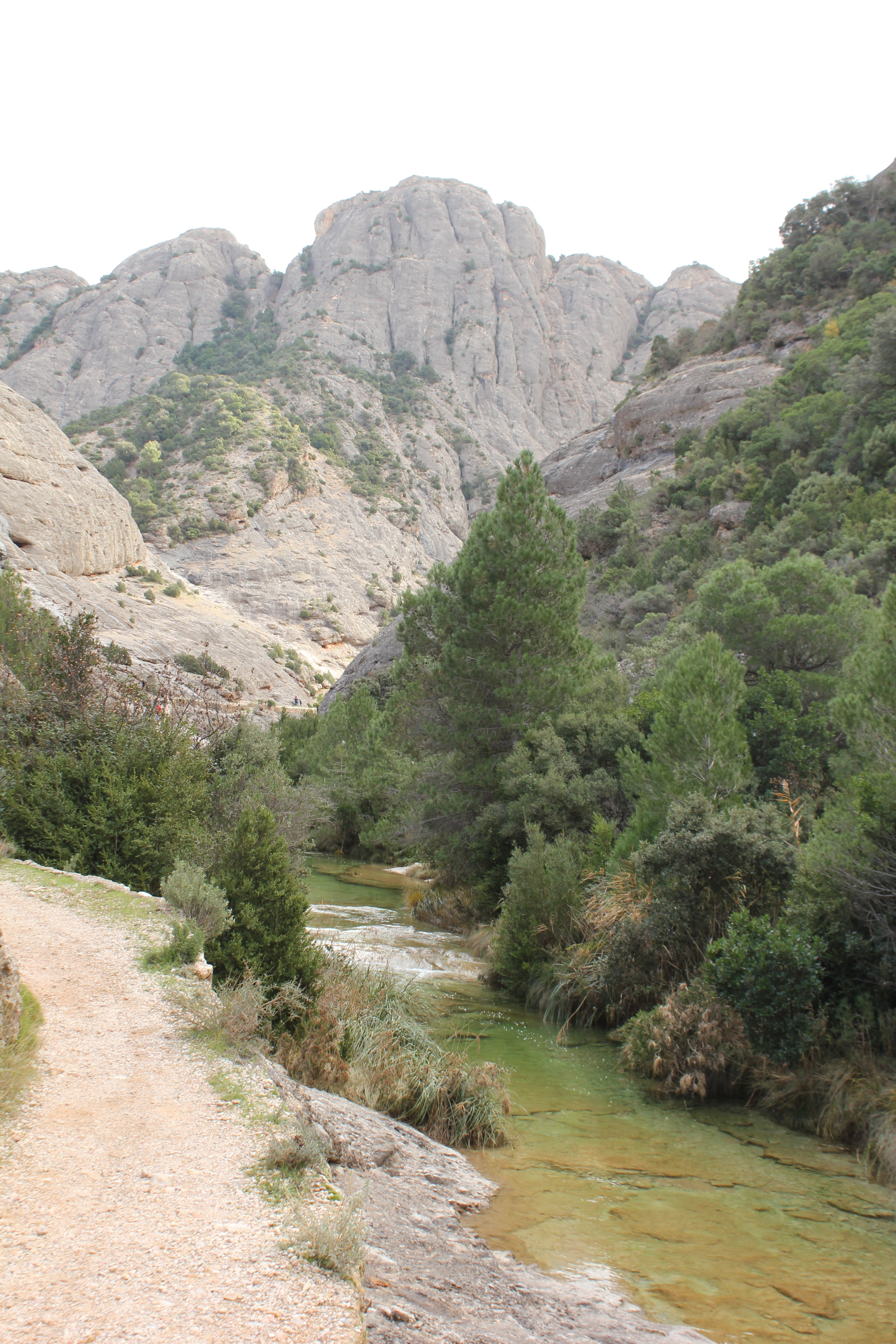 Els Estrets Arnes